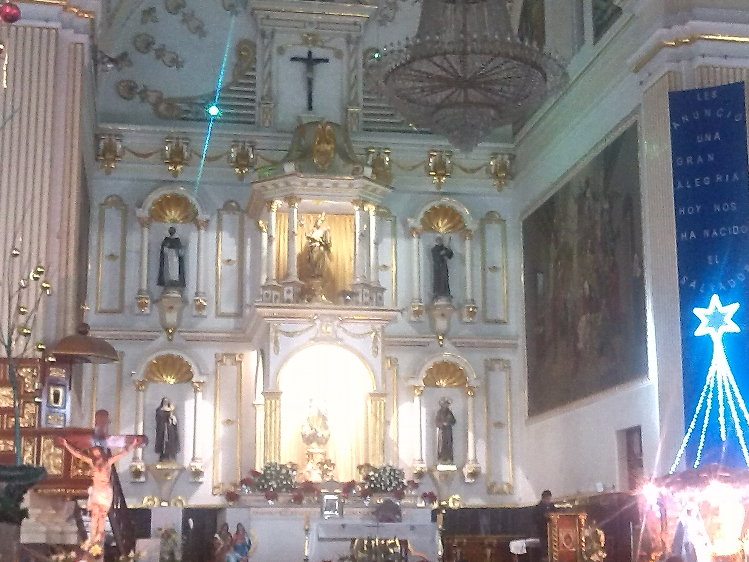 Altar Iglesia de San José. Orizaba